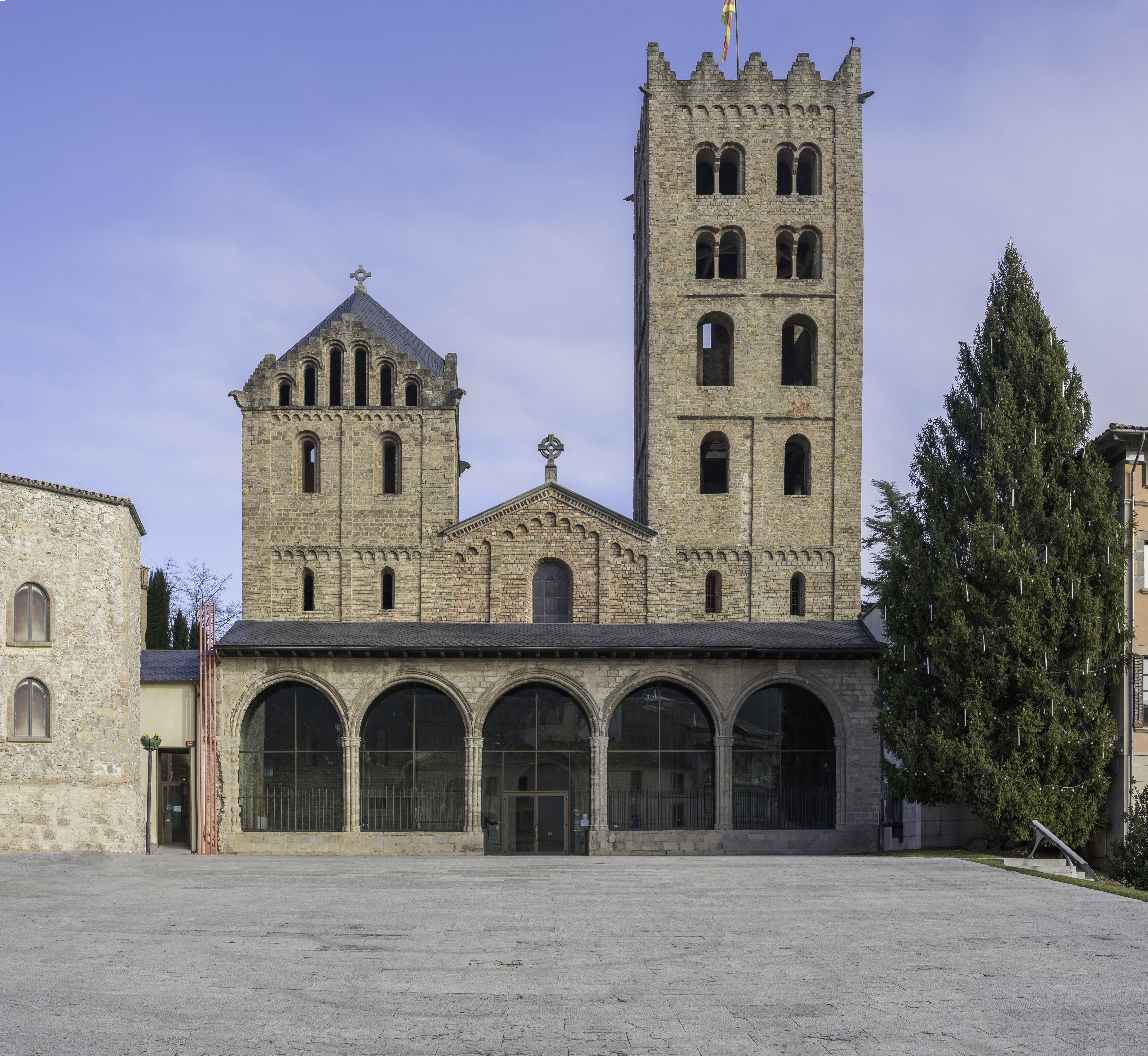 Vista exterior del Monestir